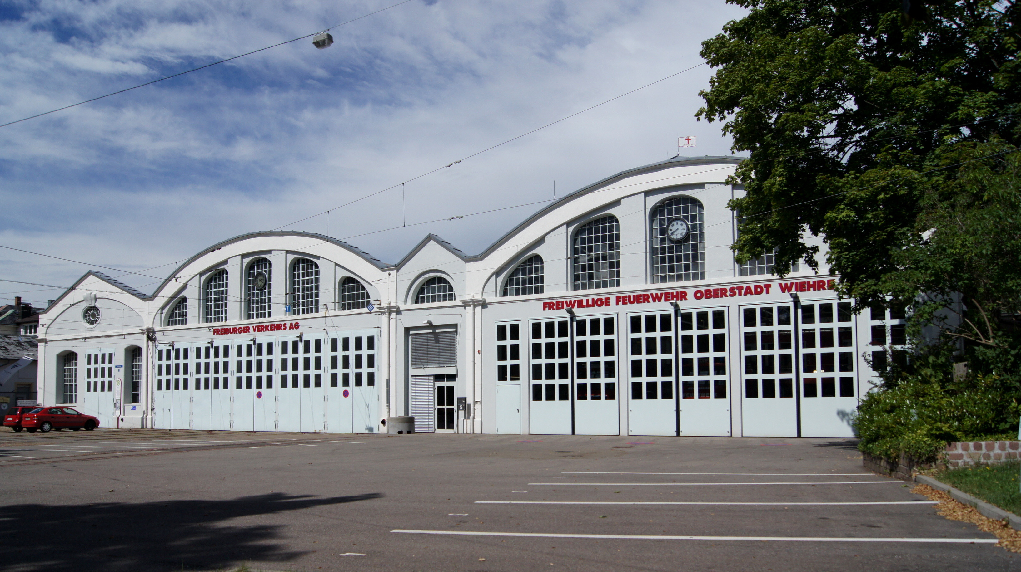 Altes Straßenbahndepot in der Urachstraße in Freiburg im Breisgau. Das Gebäude wird nun teilweise von der freiwilligen Feuerwehr benutzt.